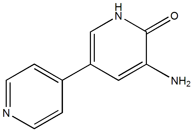 氨力农。